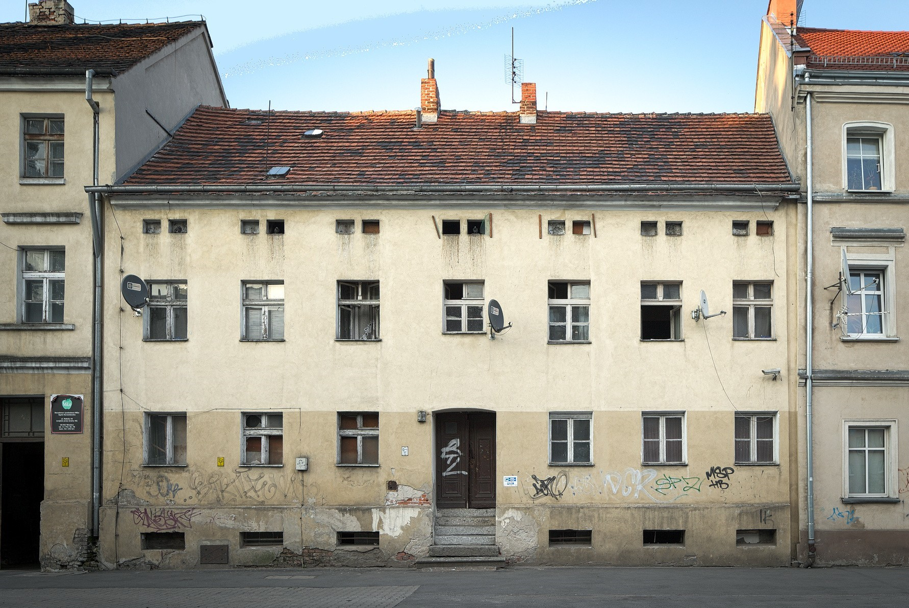 Najstarszy zachowany do XXI wieku (i w 2016 roku nadal zamieszkany) budynek przy ul. Hubskiej we Wrocławiu, zbudowany w I połowie XIX wieku